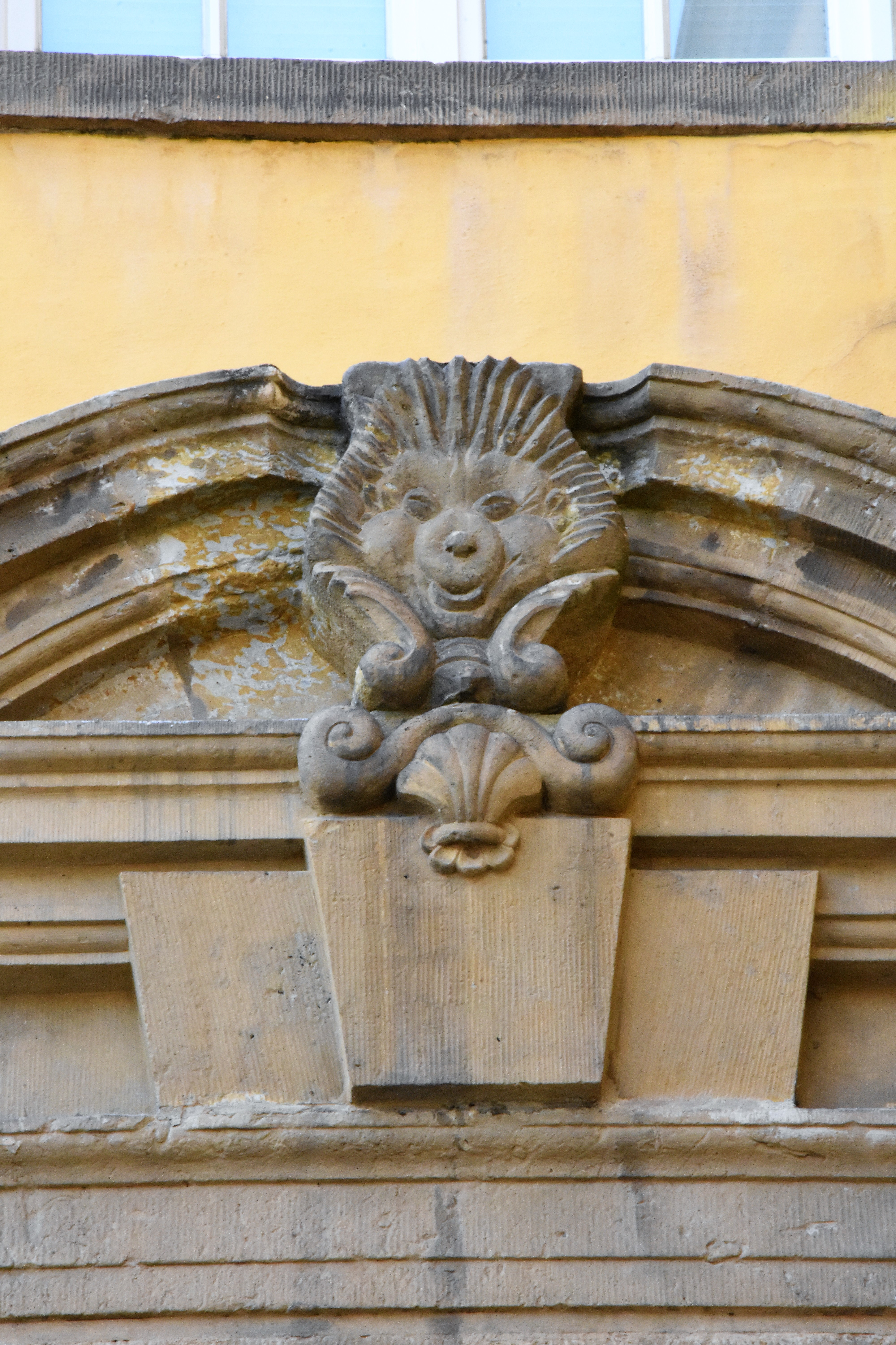 Schloss Osnabrück-Mecki Kopf über einem Fenster